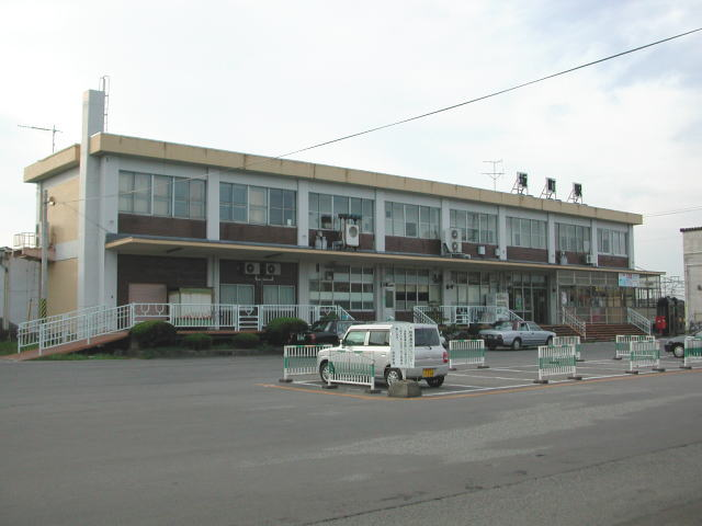 JR坂町駅